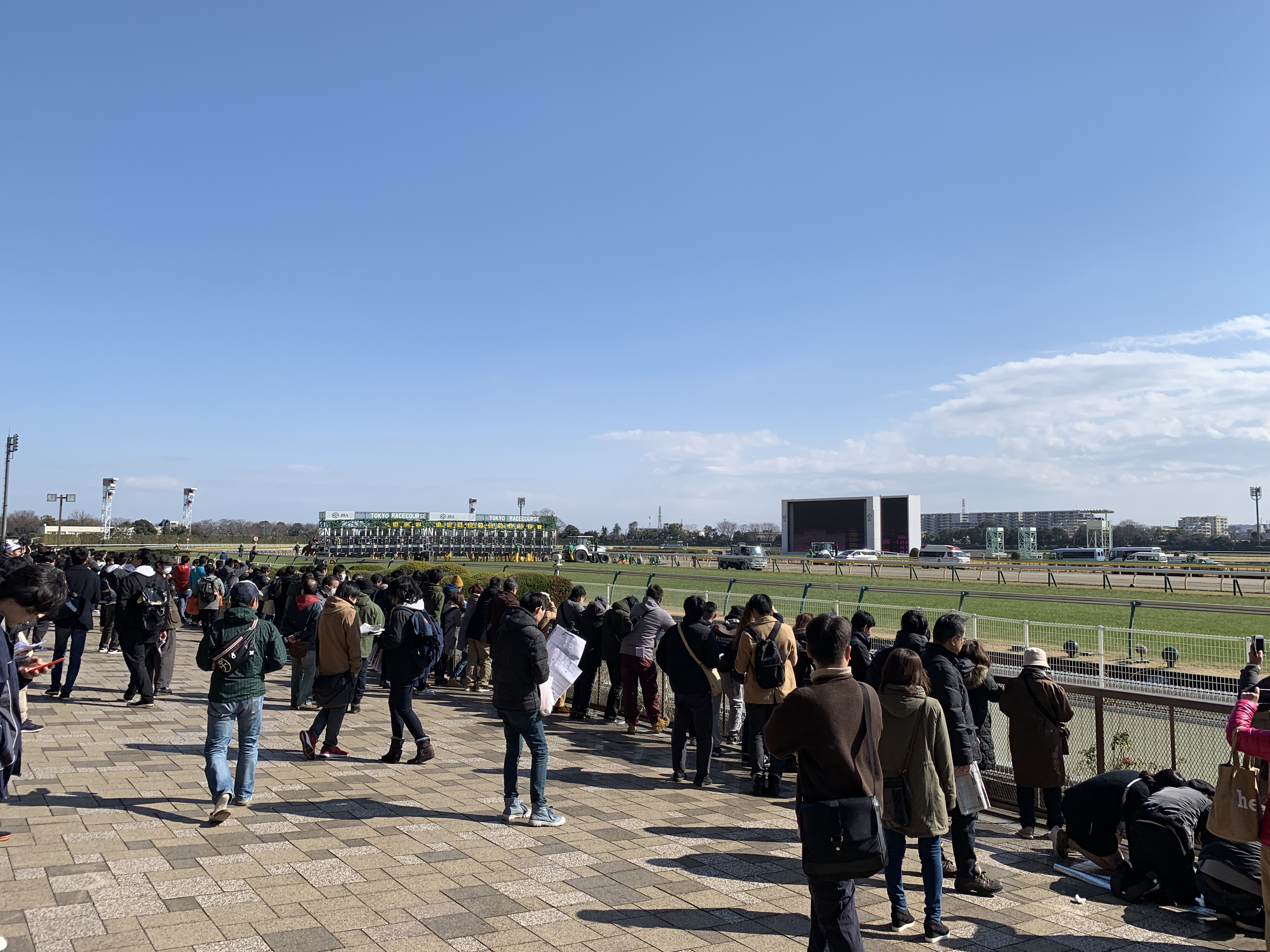 フェブラリーステークス当日の東京競馬場、晴天に恵まるる